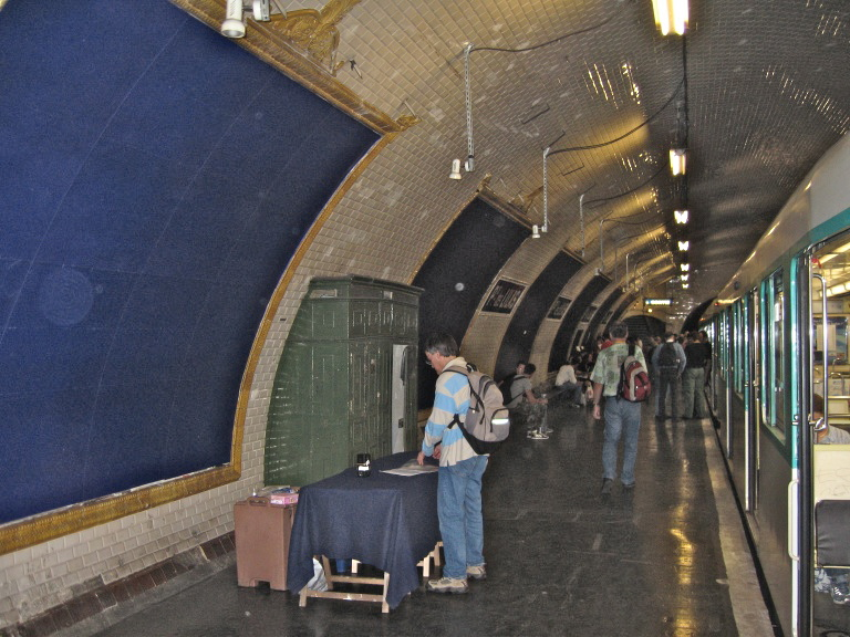 Journées du patrimoine RATP 16-17/09/2006. Ancienne station Porte des Lilas du métro de Paris, utilisée par la voie Navette.